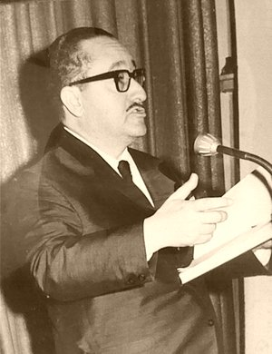 Poeta venezolano ganador del premio nacional de literatura 1957